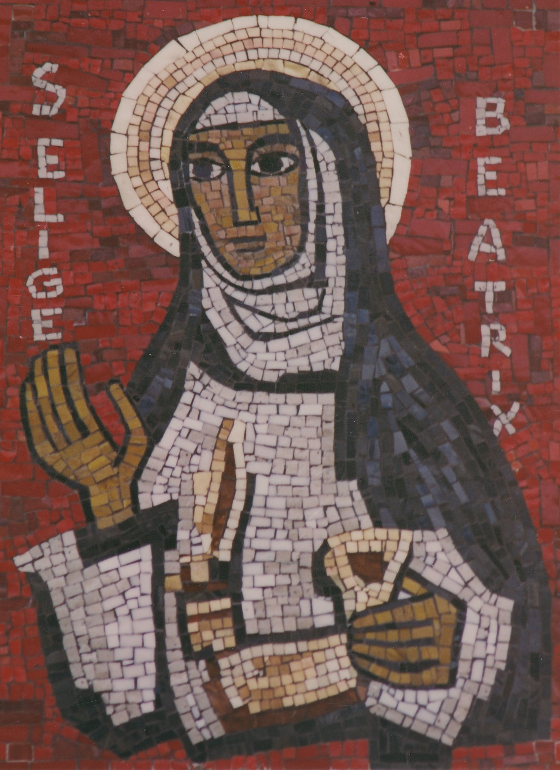 Selige Beatrix von Engelport - Mosaik an der Außenmauer der alten Klosterkirche Maria Engelport; 1972 erstellt von den Benediktinerinnen Unserer Lieben Frau in Varensell.